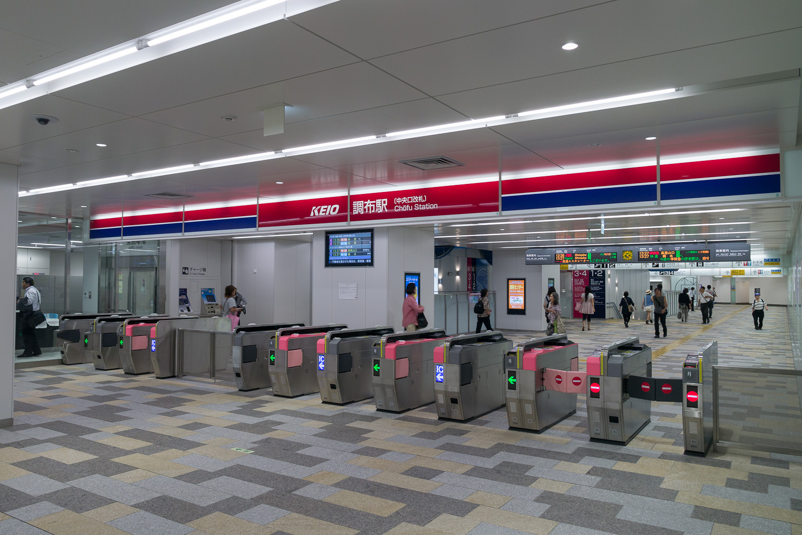 京王電鉄調布駅、地下化された中央改札口。